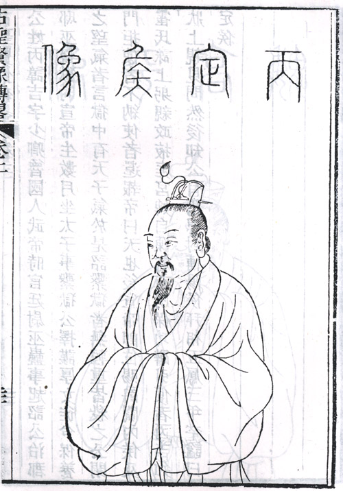 汉丞相丙吉像。像取自清顾沅辑，道光十年刻本《古圣贤像传略》。